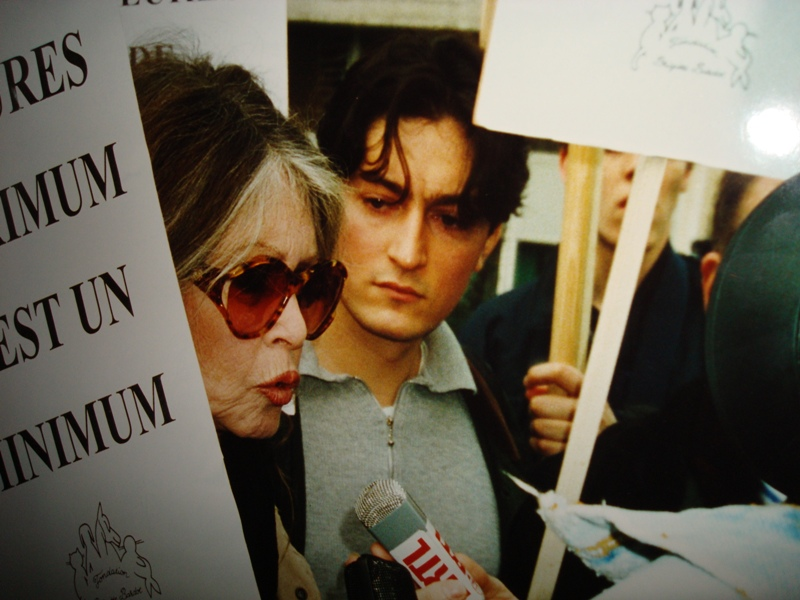 Œuvre de Christophe Marie - publiée par Arnaud 25 : Brigitte Bardot et Christophe Marie (porte-parole de la Fondation Brigitte Bardot) : manifestation à Bruxelles en février 1995